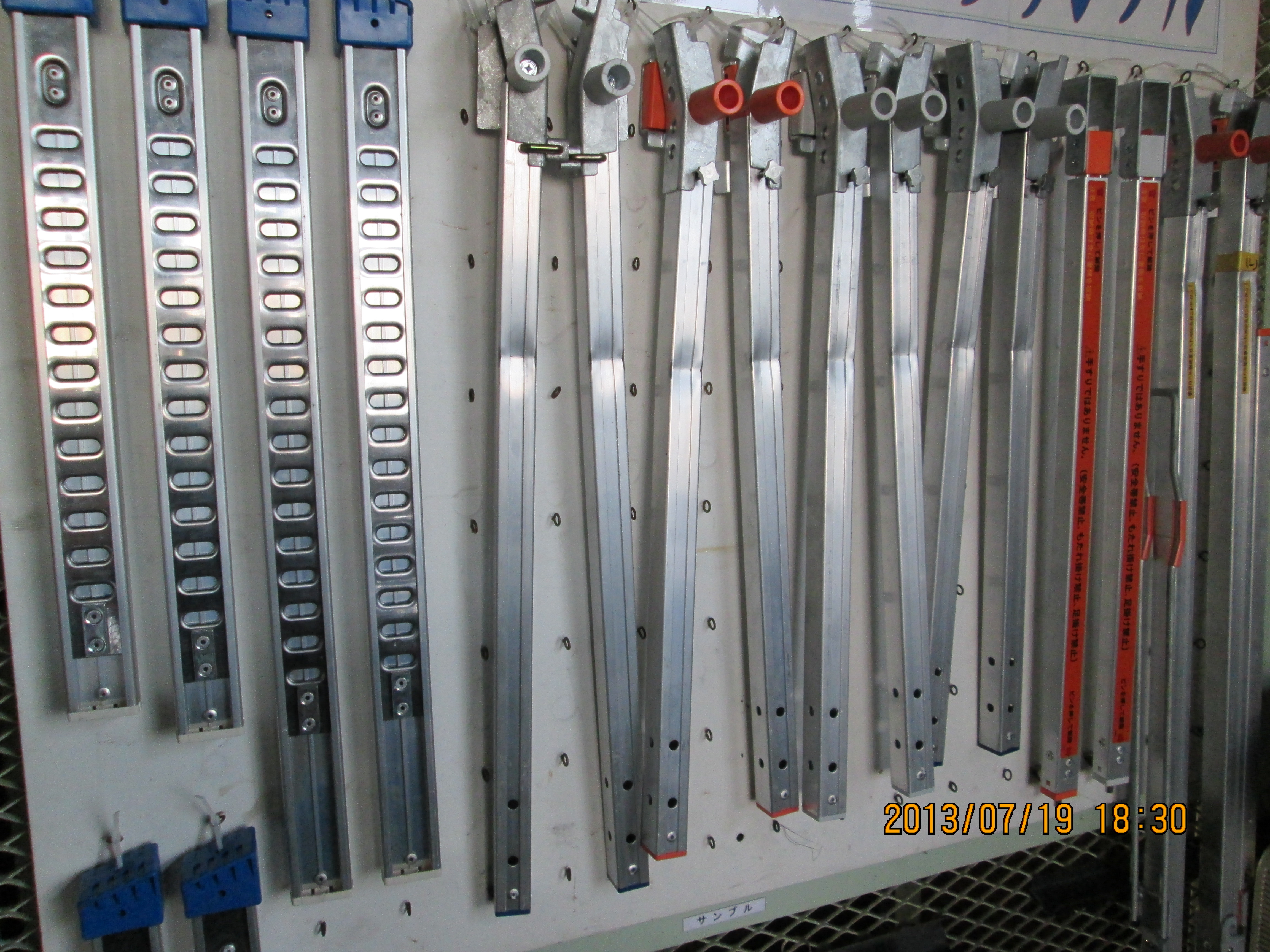 アルインコで生産されている部品の一部